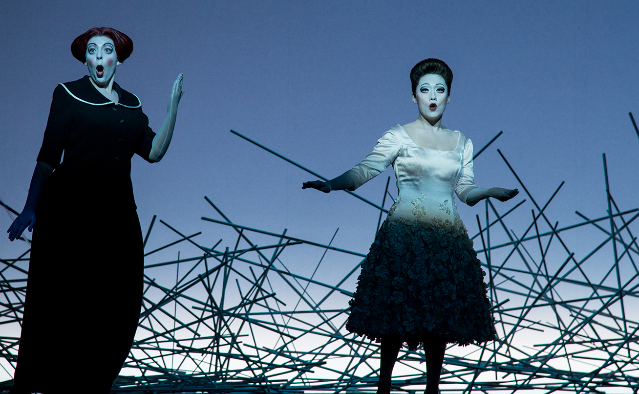 La Traviata, Wilson